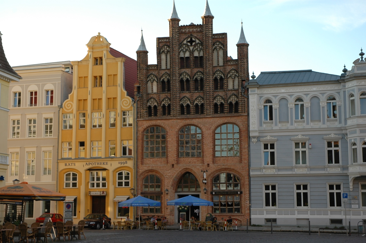 Stralsund - Markt (Nordseite) fotografiert von harald909 am 14.08.2004 GNU-FDL